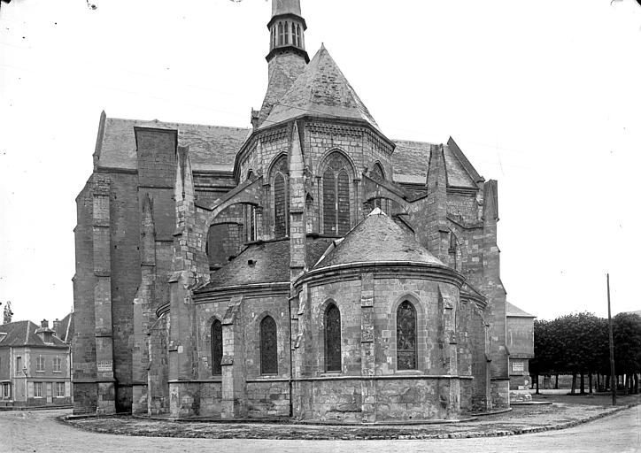 Abside de l'église Saint-Sauveur du Petit-Andely par Martin-Sabon.